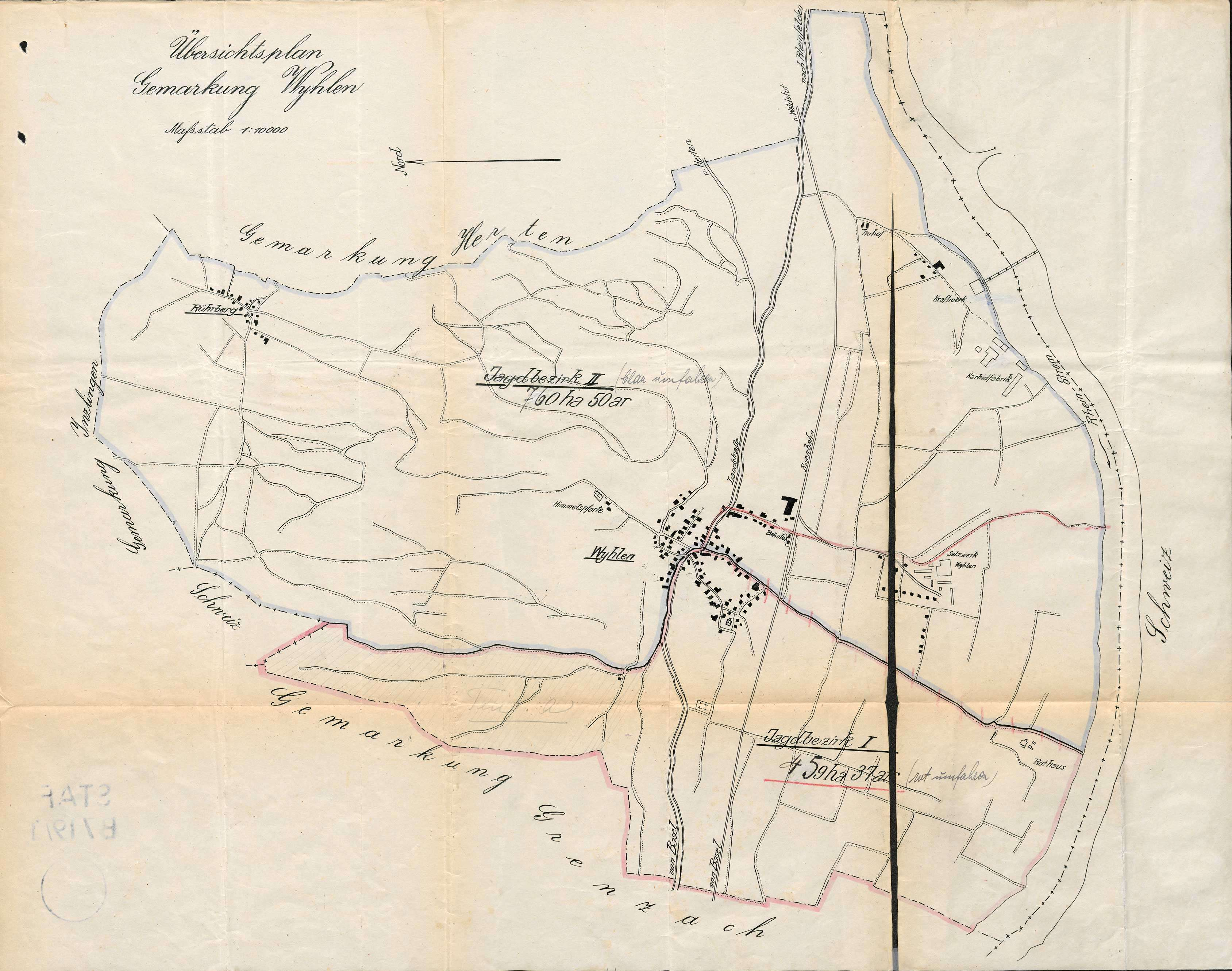 Karte der Jagdreviere auf der Gemarkung der Gemeinde Wyhlen (unmittelbar an der Schweizer Grenze), Baden, 1920/21 - zu sehen ist eine Erweiterung von Jagdbezirk I (rote Umrandung) oder ein Flächentausch mit Jagdbezirk II (blaue Umrandung), die evtl. in Zusammenhang steht mit der in der Orginalbeschreibung erwähnten "Verpachtung der Jagd an den schwedischen Konsul" "Enthält u.a.: Verpachtung der Jagd an den schwedischen Konsul Darin: Übersichtspläne der Gemarkungen Wyhlen und Herten mit Eintragung der Jagdgrenzen (1920, 1921)", " Landesarchiv Baden-Württemberg, Abt. Staatsarchiv Freiburg Baden 1806-1945: Untere Behörden, untere Sonderbehörden Geschäftsbereich Ministerium des Innern Bezirksämter, Landratsämter Landratsamt Lörrach / (1527 - 1808) 1809 - 1952 (1953 - 1973) Ortsakten Wyhlen Jagdsachen Archivalieneinheit ", "Identifikatoren/Sonstige Nummern: B 719/1 Nr. 6736 [Bestellsignatur]"